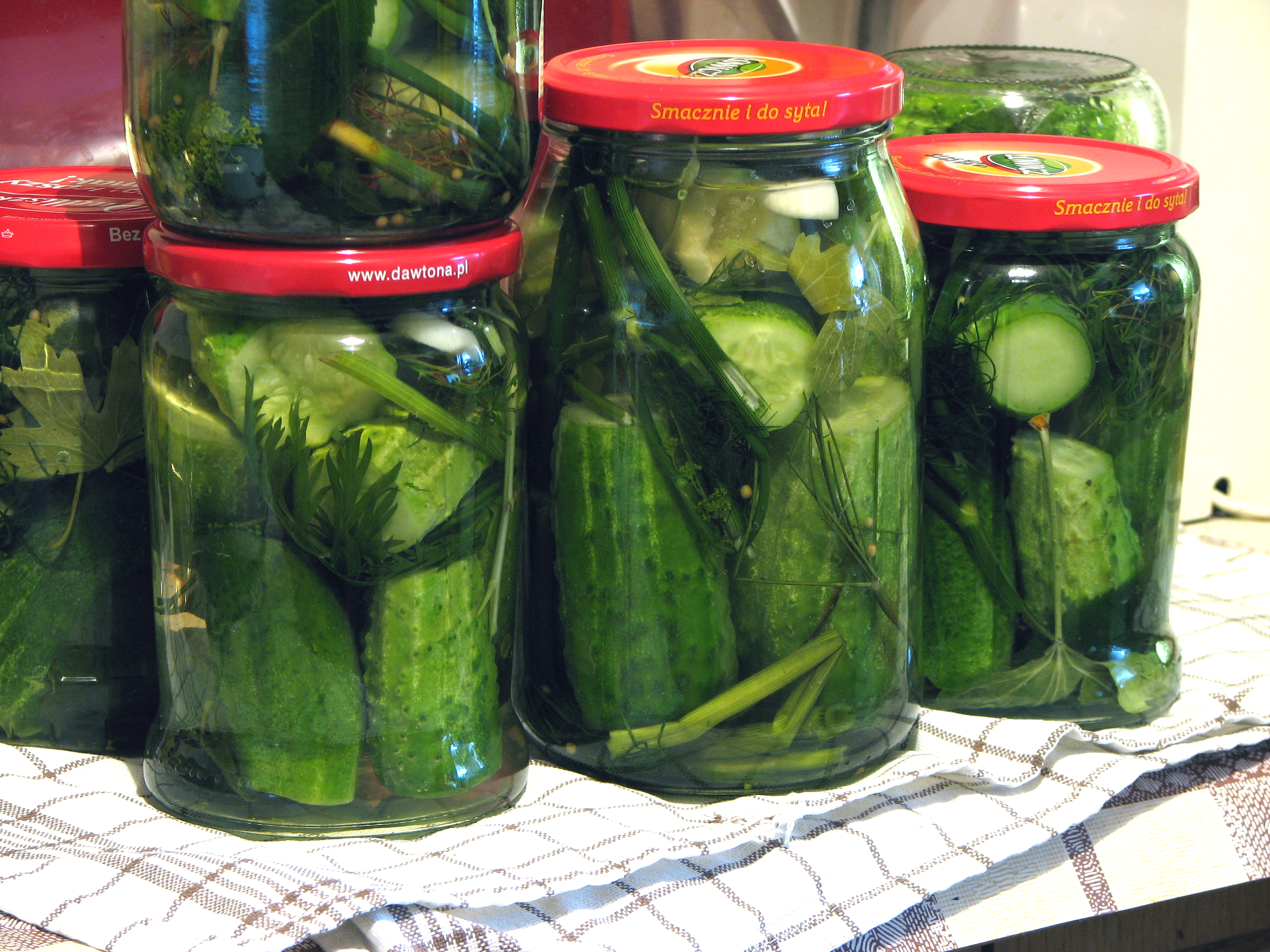 kiszenie górków domowymi metodami